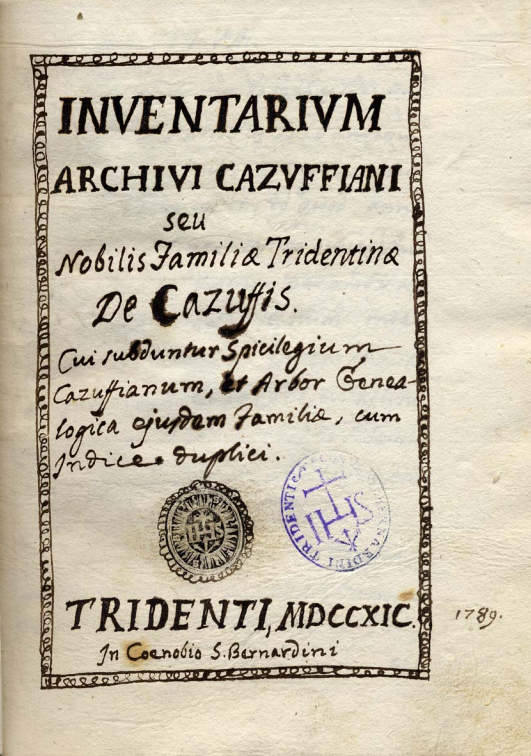 Capa do manuscrito Inventarium Archivi Cazuffianum, de Giangrisostomo Tovazzi